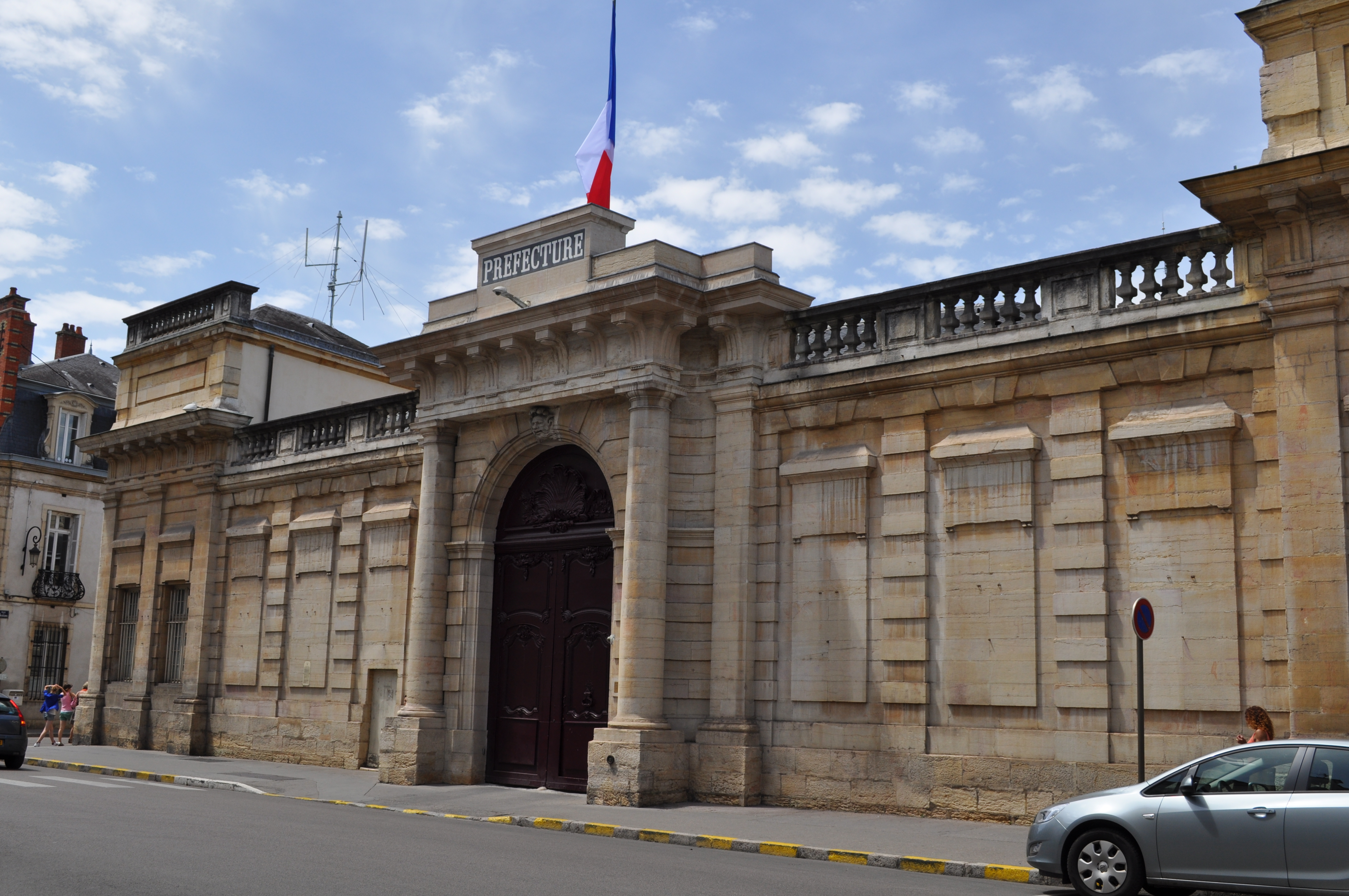 Façade de la préfecture de la région Bourgogne et de la Côte-d'Or, à Dijon.